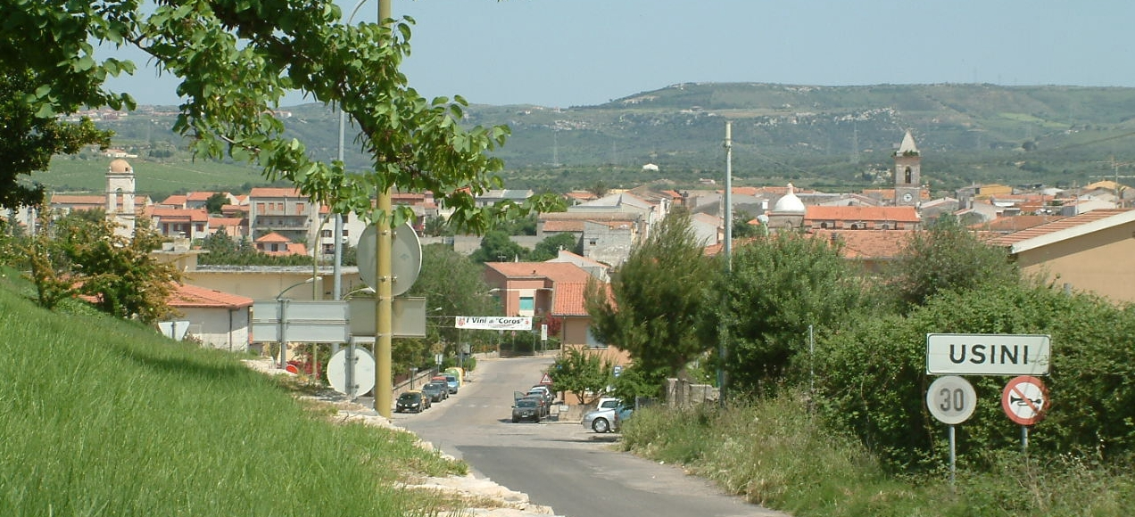 Usini, ingresso da via del Vermentino